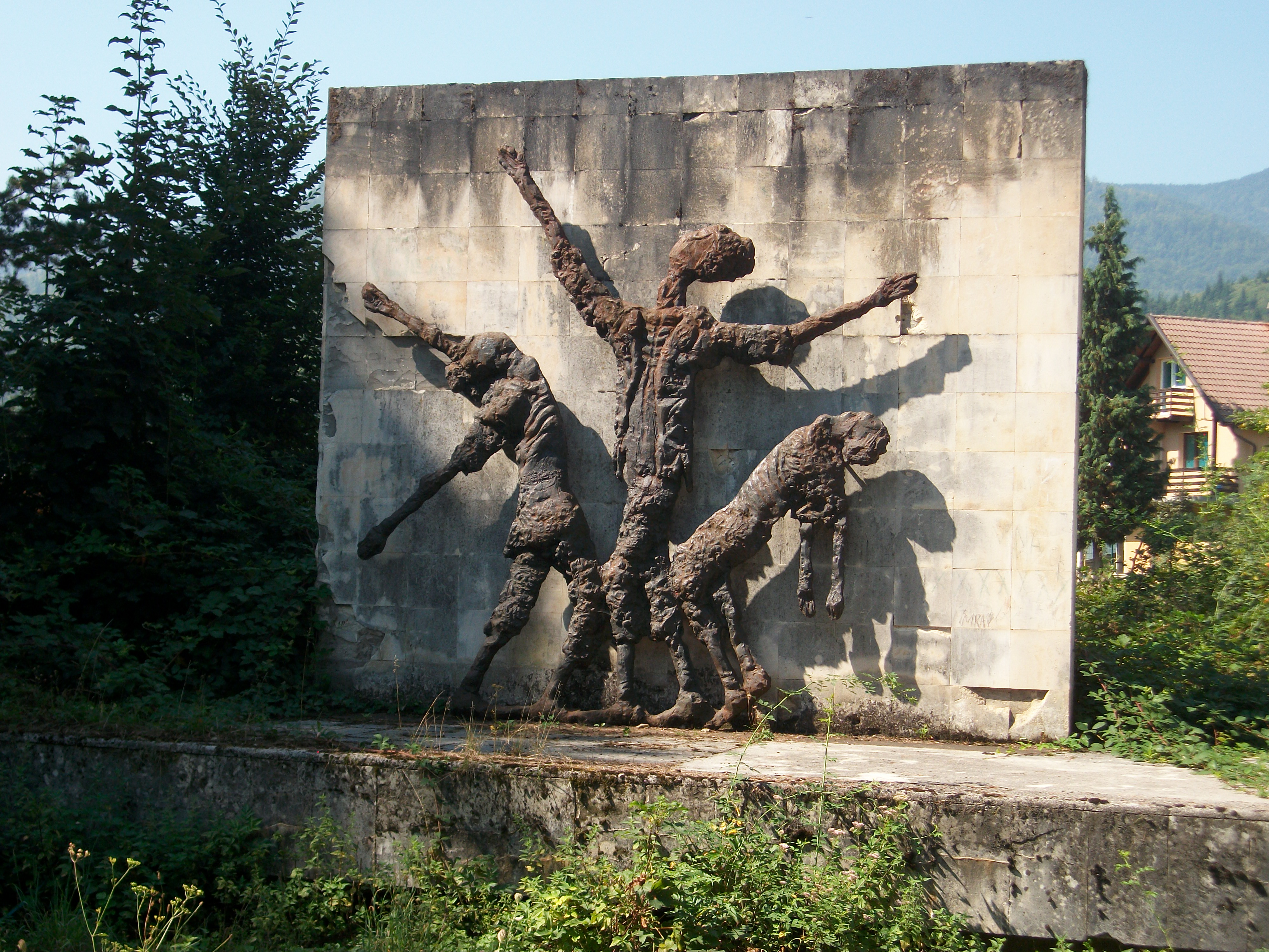 Spomenik u bivšem koncentracionom logoru Kruščica u Vitezu, Bosna i Hercegovina